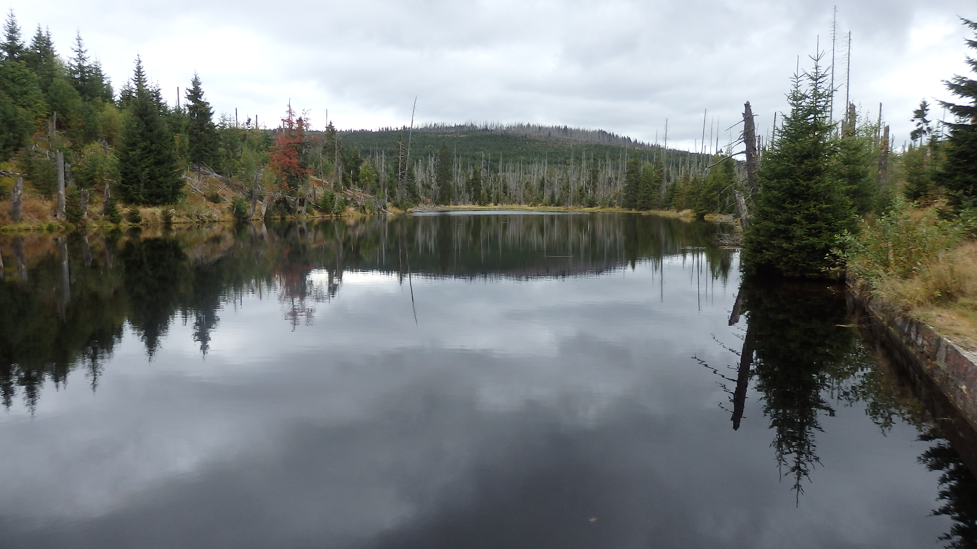 nádrž na plavení dřeva - Reschbachklause, Německo, nedaleko pramene Vltavy